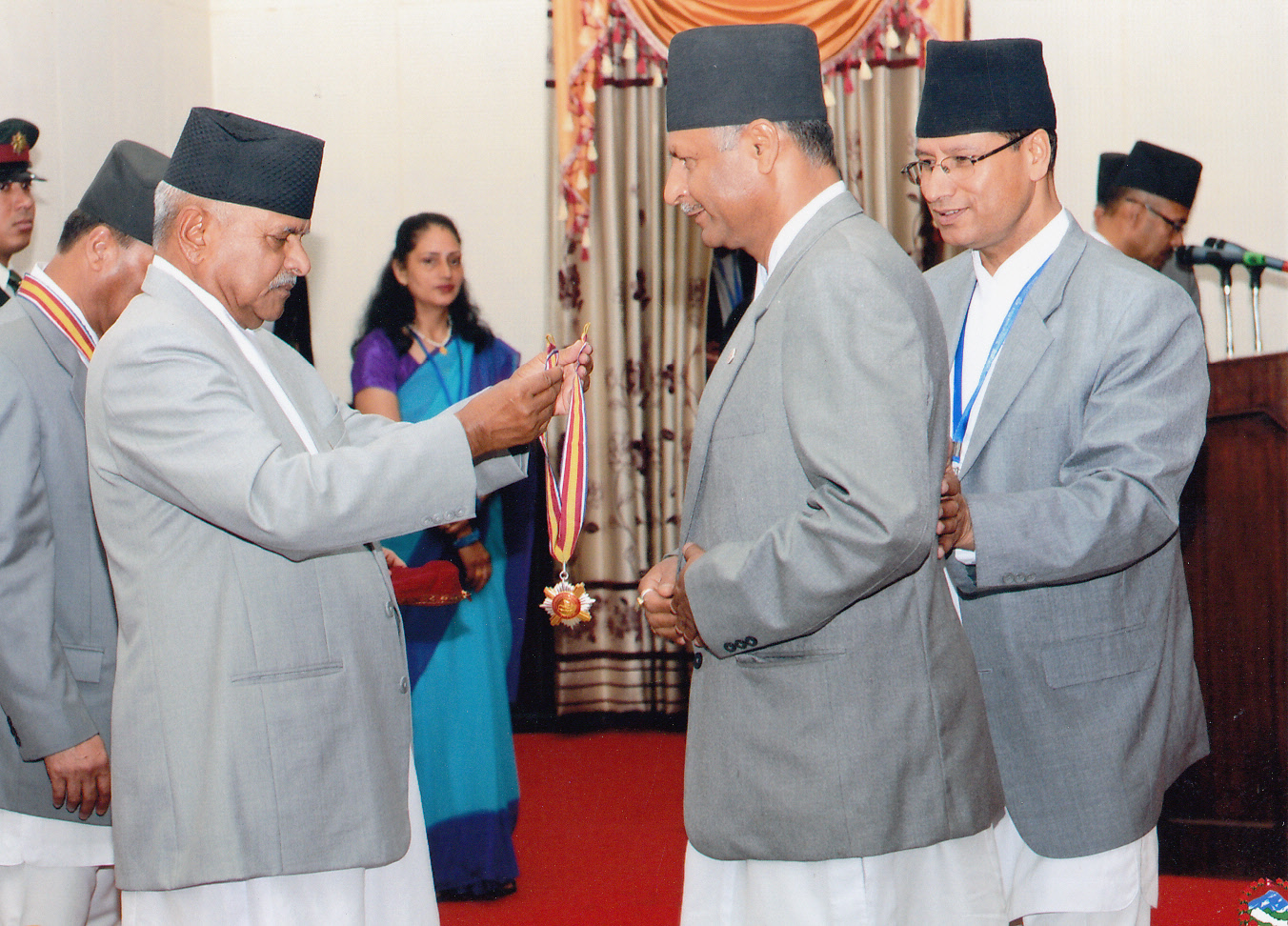 नेपाली: राष्ट्रपति रामवरण यादवबाट सुप्रबल जनसेवा श्री को विभूषण ग्रहण गर्दै, बैशाख २०७२